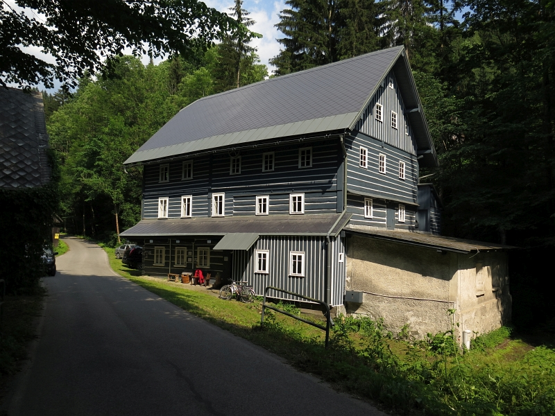 Janatův mlýn, Buřany 37, Buřany.